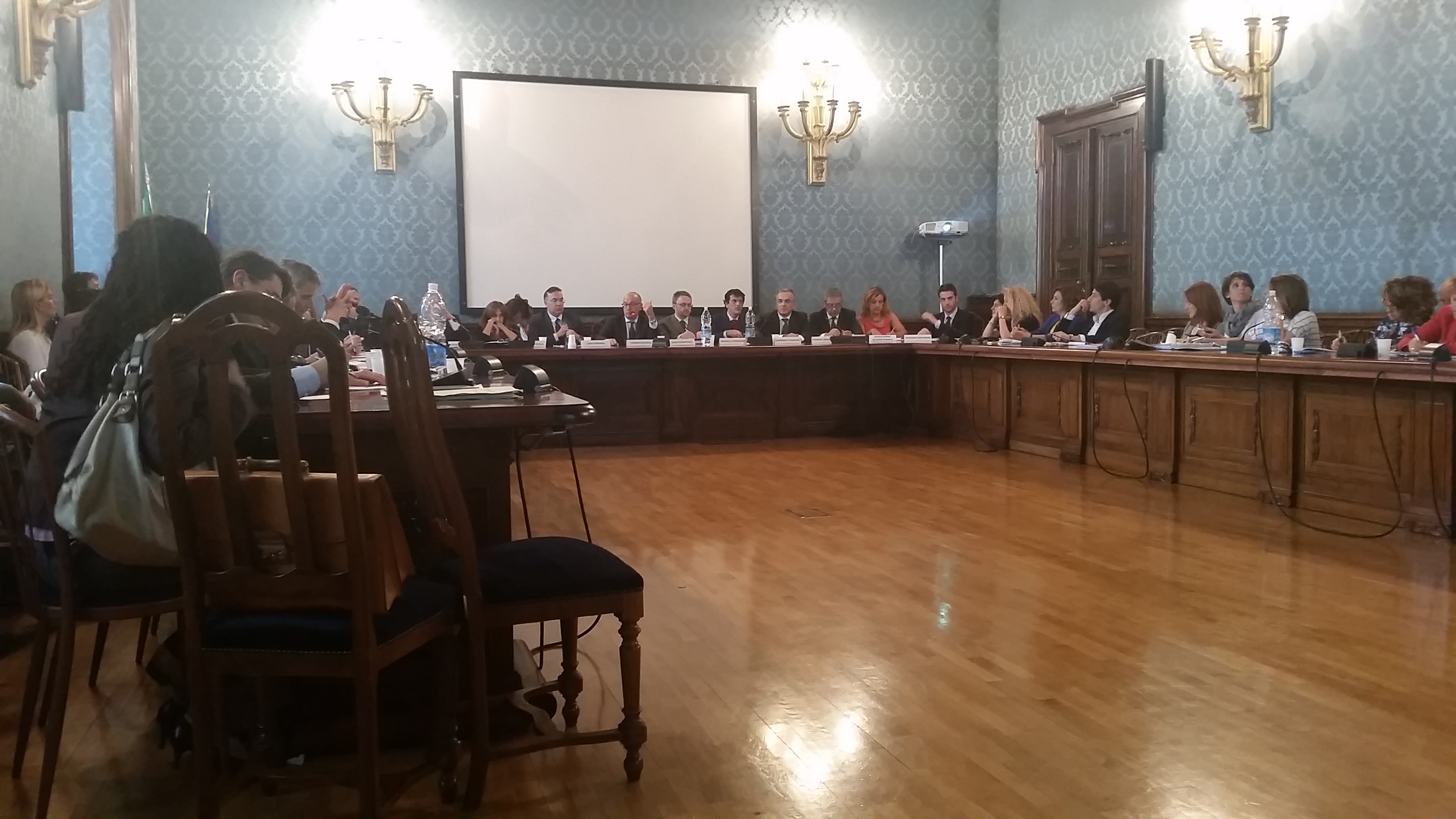 Prima riunione delle 35 Centrali Acquisti a Roma, 2015. Al centro: Luigi Ferrara (MEF), Yoram Gutgeld (Commissario alla revisione della spesa), Luigi Fiorentino (PCM), Michele Corradino (ANAC), Domenico Casalino (Consip).